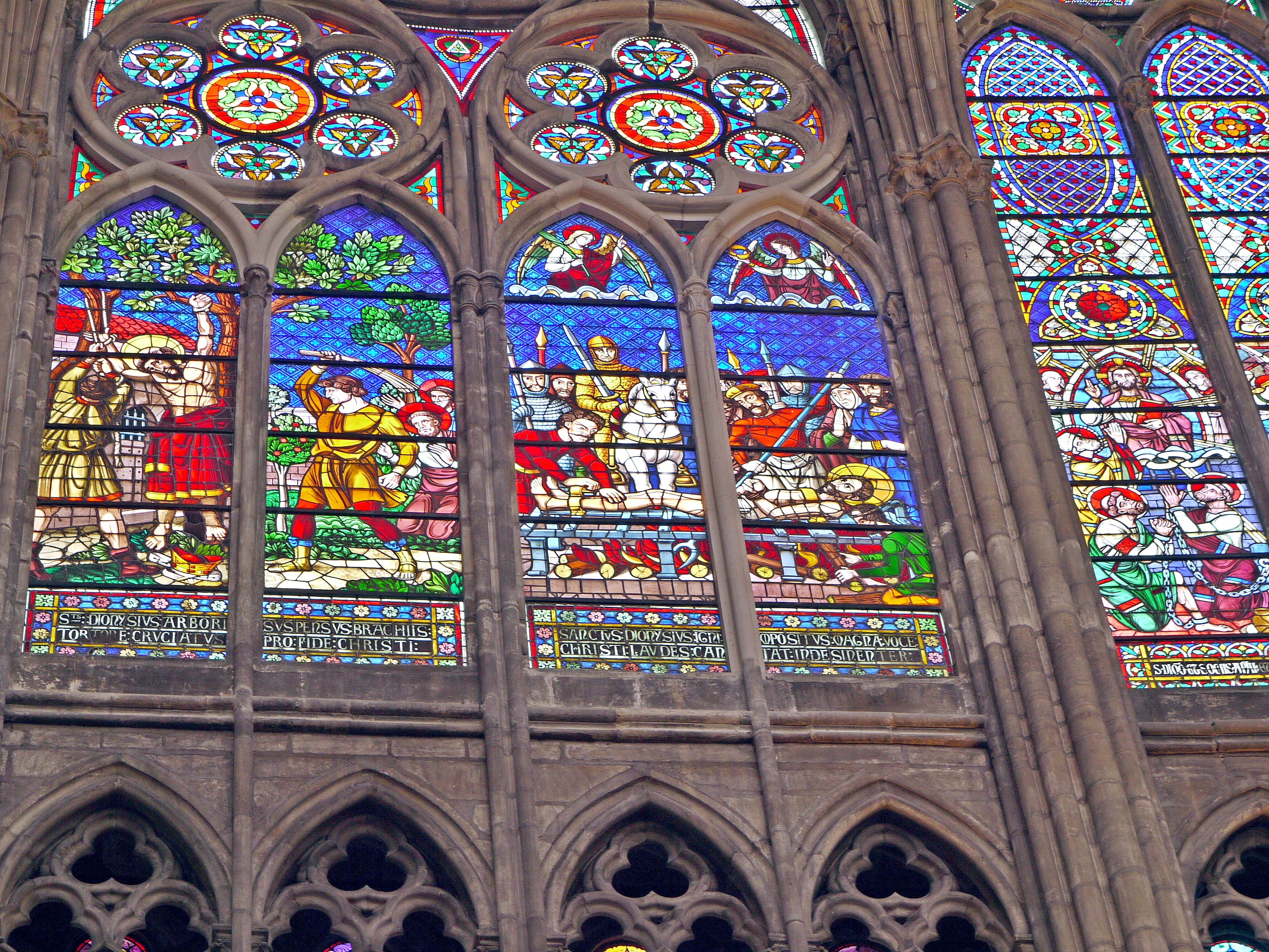 Vitrail illustrant la passion du Christ, dans la basilique Saint-Denis (France). .